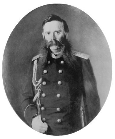 Граф Алексей Павлович Бобринский (1826—1894)